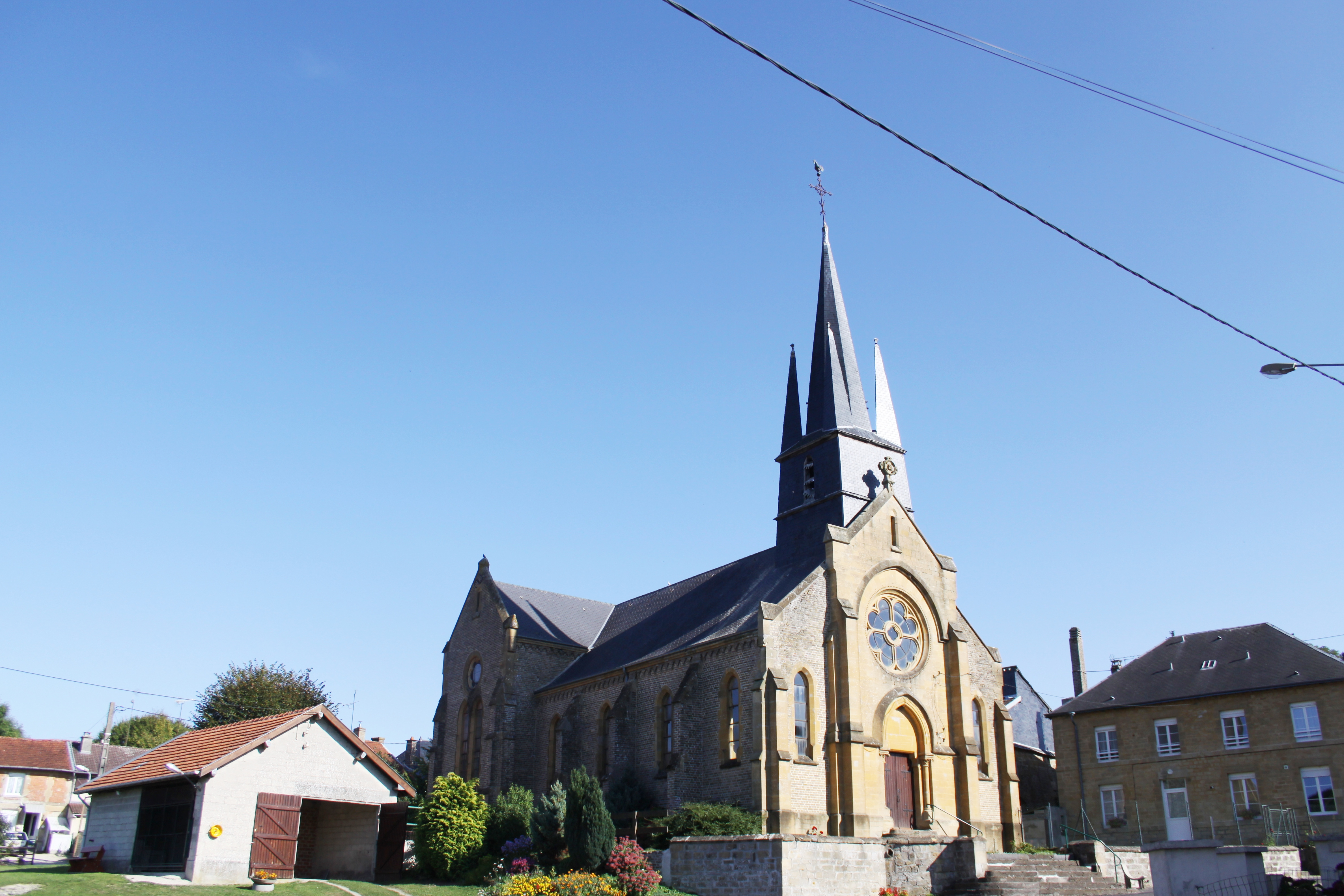 Village Ardennais